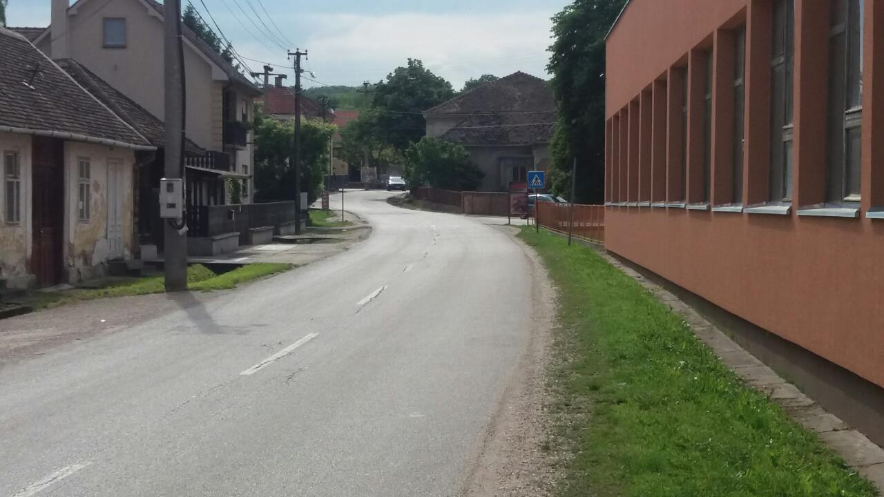 Српски (ћирилица): Главна улица у Средњеву